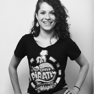 Synchronsprecherin und Piratenpolitikerin Anne Helm - CC-BY-SA/photo: bartjez.cc